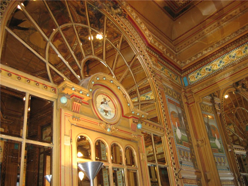 Vue de l'intérieur de la Brasserie La Cigale à Nantes.